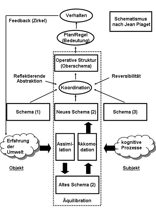 Graphik zur Erläuterung des Konzepts des Schematismus bei Jean Piaget